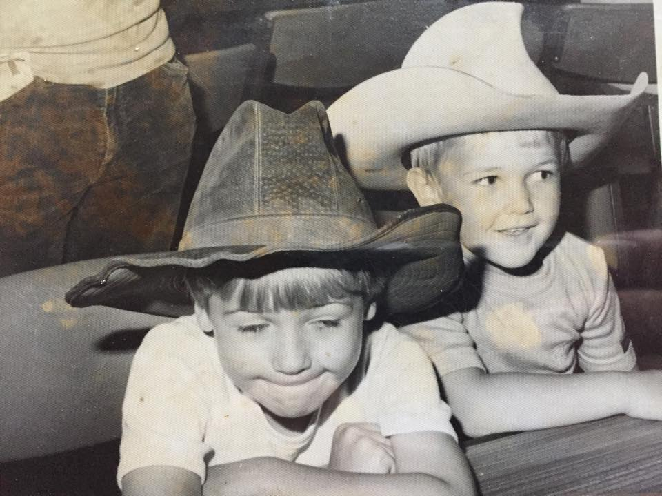 Foto van mijn broer en ik